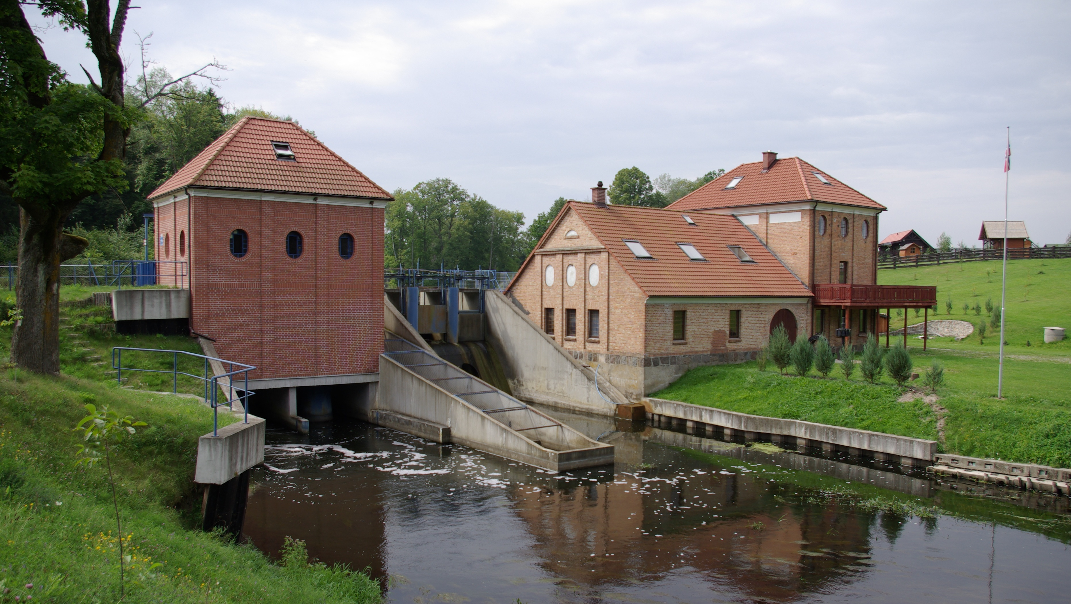 Ołownik